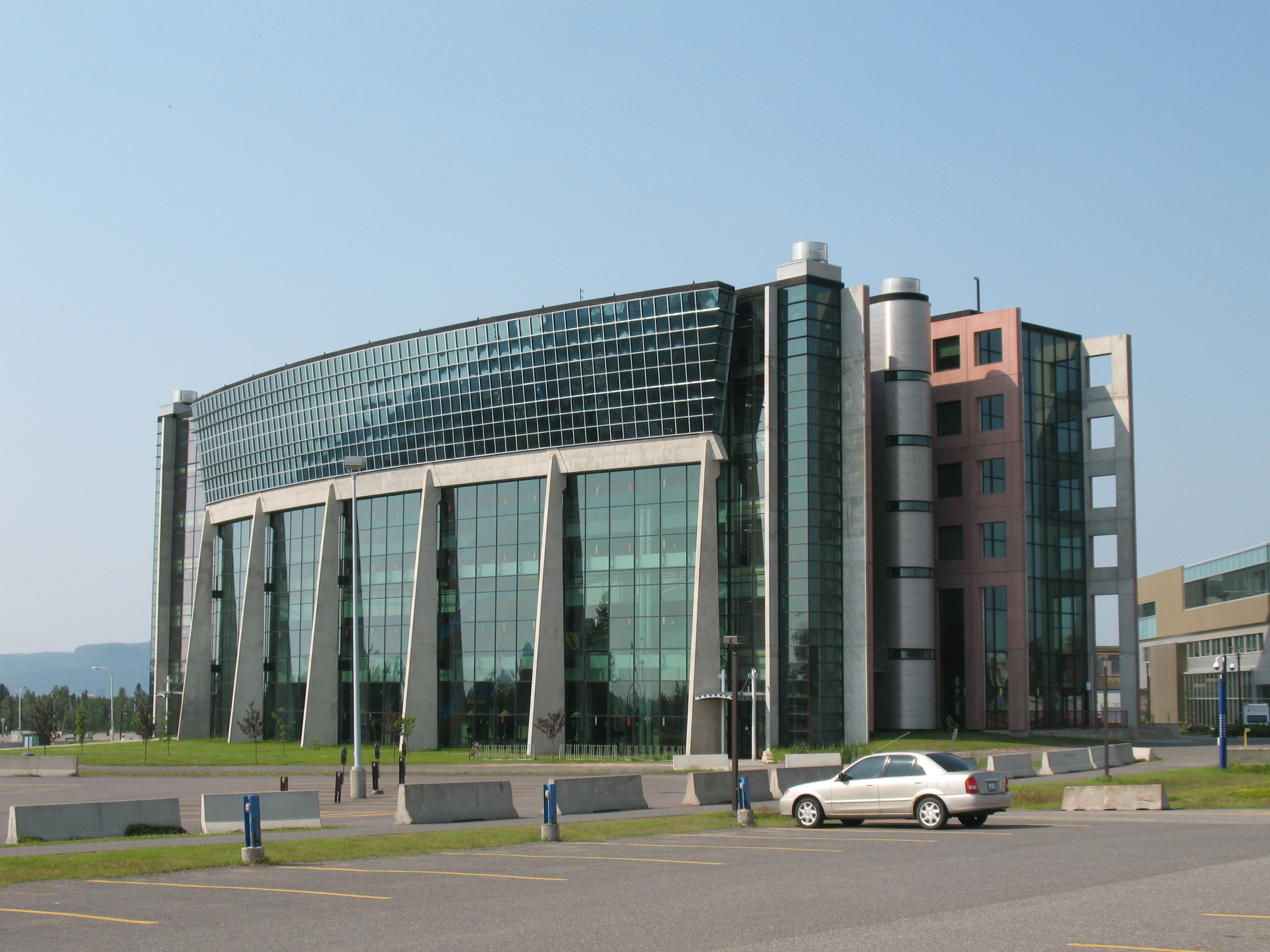 Lakehead University, Thunderbay, Nord-Ontario